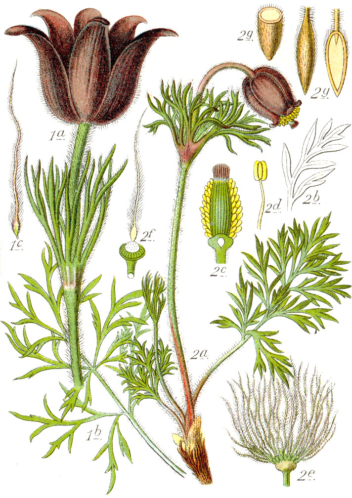 1: Anemone pulsatilla L., syn. Pulsatilla vulgaris var. vulgaris 2: Anemone pratensis L., syn. Pulsatilla pratensis (L.) Mill. Original Caption 1. Grosse Kuhschelle, Anemone pulsatilla 2. Kleine Kuhschelle, A. pratensis